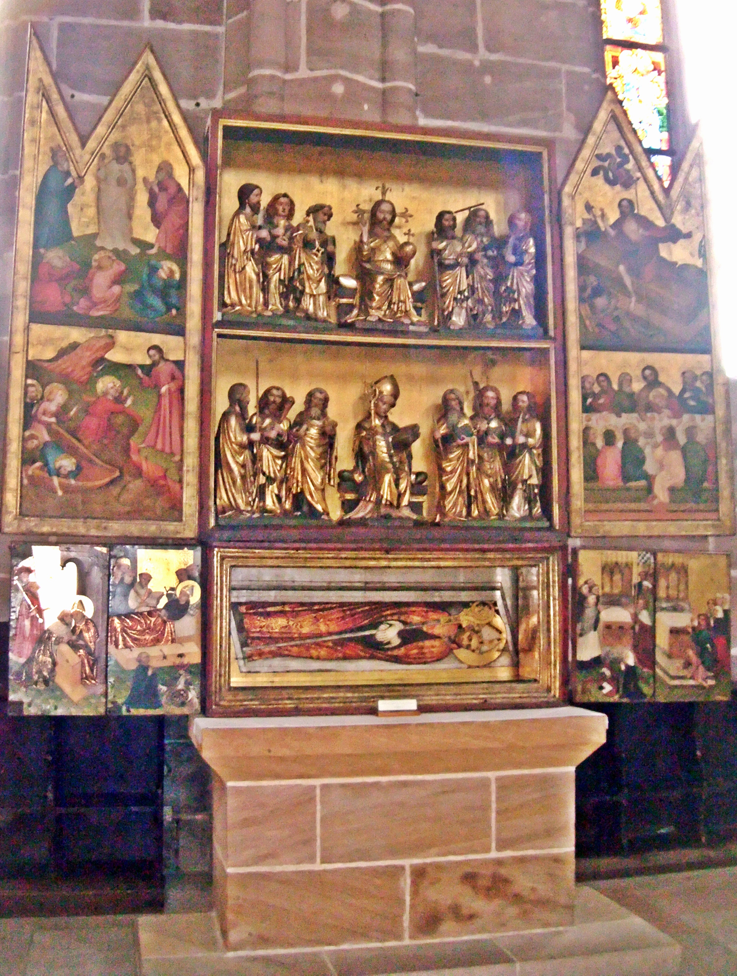 Deocar-Altar, Nürnberg, St. Lorenz-Kirche